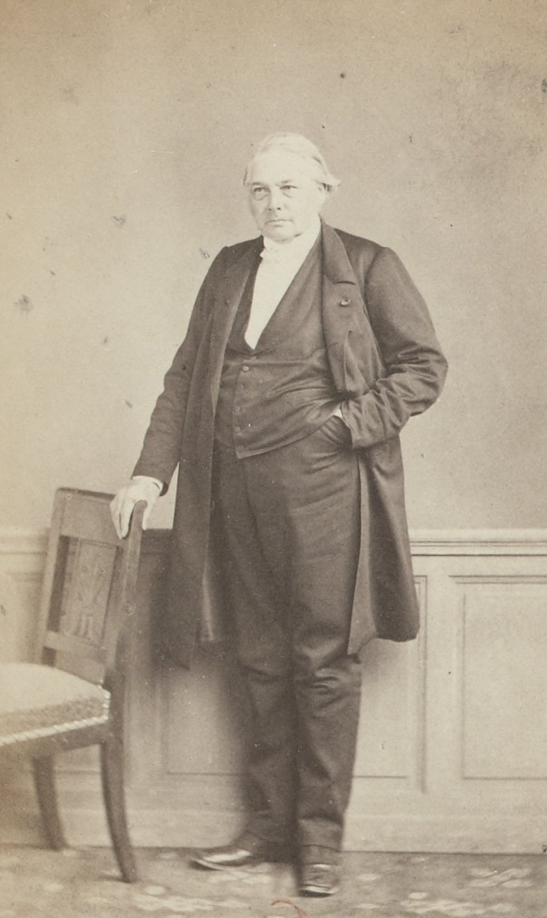 Album des députés au Corps législatif entre 1852-1857.